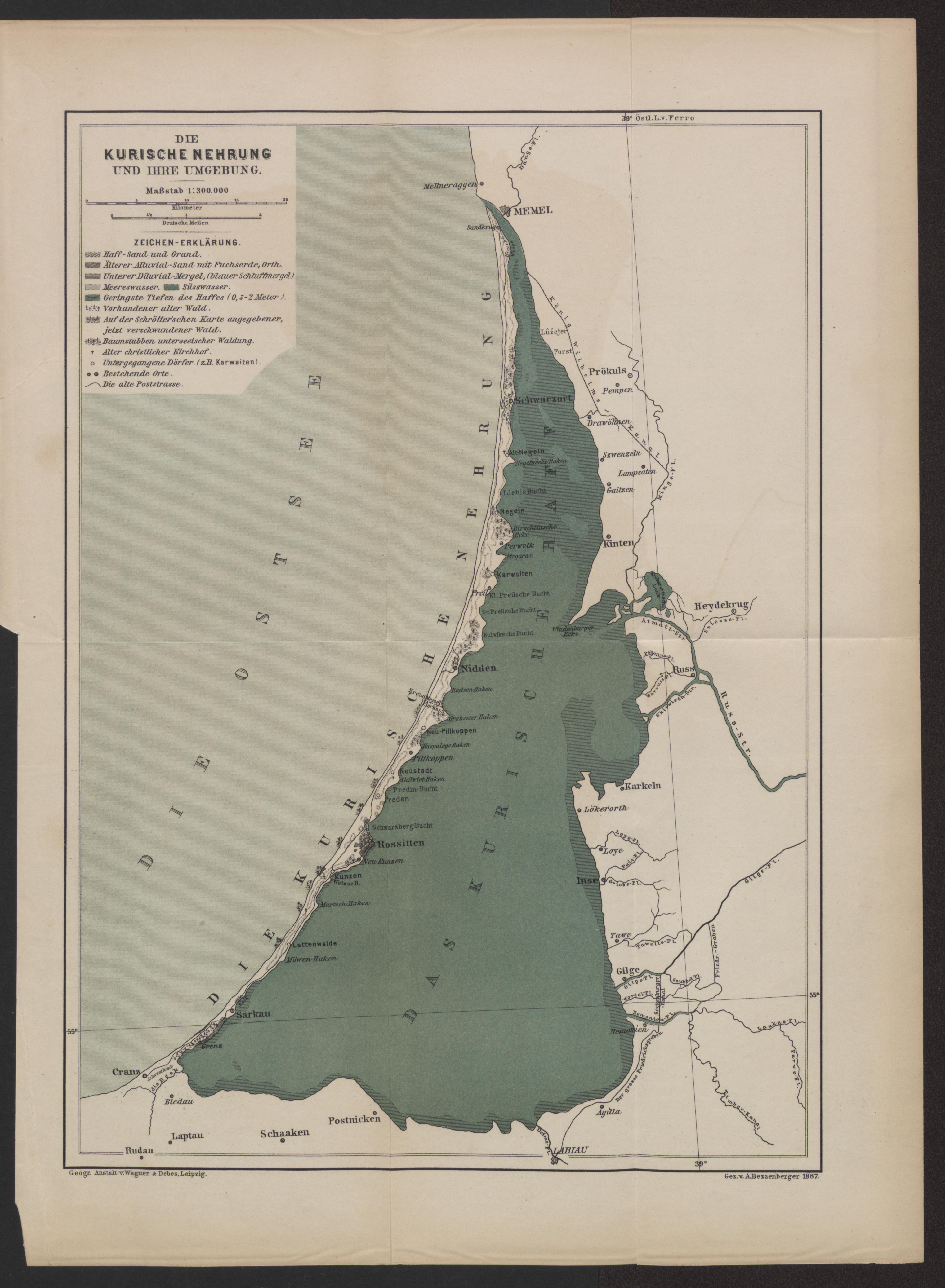 Russland, Litauen